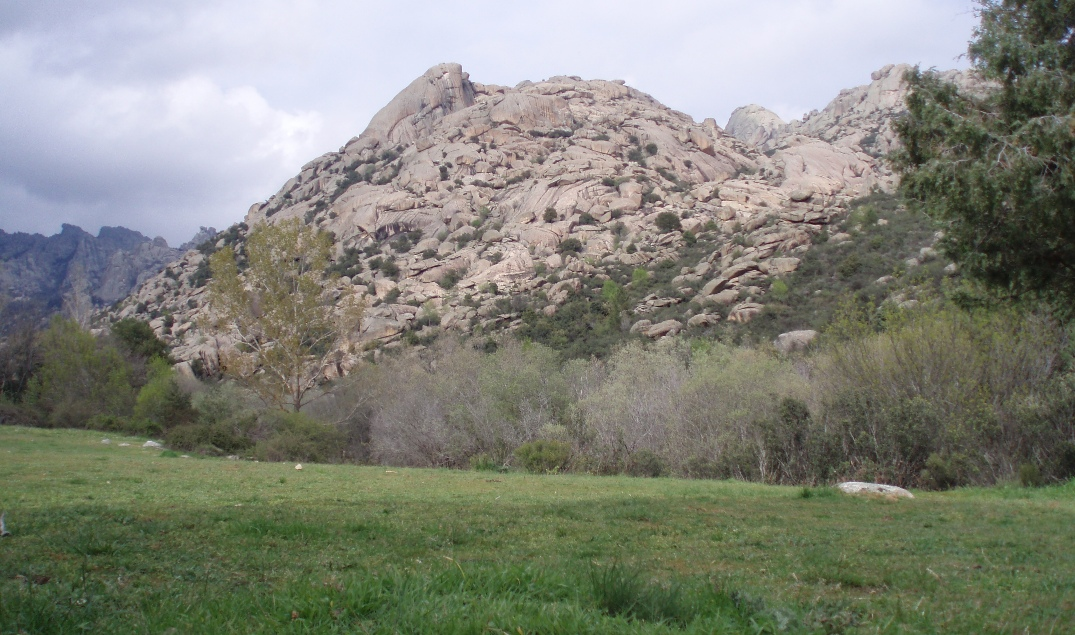 Imagen de La Pedriza Anterior (Comunidad de Madrid, España) vista desde una pradera situada en la desembocadura del Arroyo de la Dehesilla en el Río Manzanares. Este pequeño prado está al oeste de La Pedriza Anterior y muy próximo a Canto Cochino, un aparcamiento muy popular en La Pedriza por ser considerado como punto de partida de numerosas rutas por esta zona de la Sierra de Guadarrama. En el extremo izquierdo de la fotografía se ven riscos de La Pedriza Posterior y en el centro de la imagen se ve la Peña Sirio, uno de los numerosos riscos en los que se practica la escalada. A la derecha de esta peña se aprecia El Yelmo, el pico más importante de La Pedriza y uno de los más altos con sus 1.717 metros.